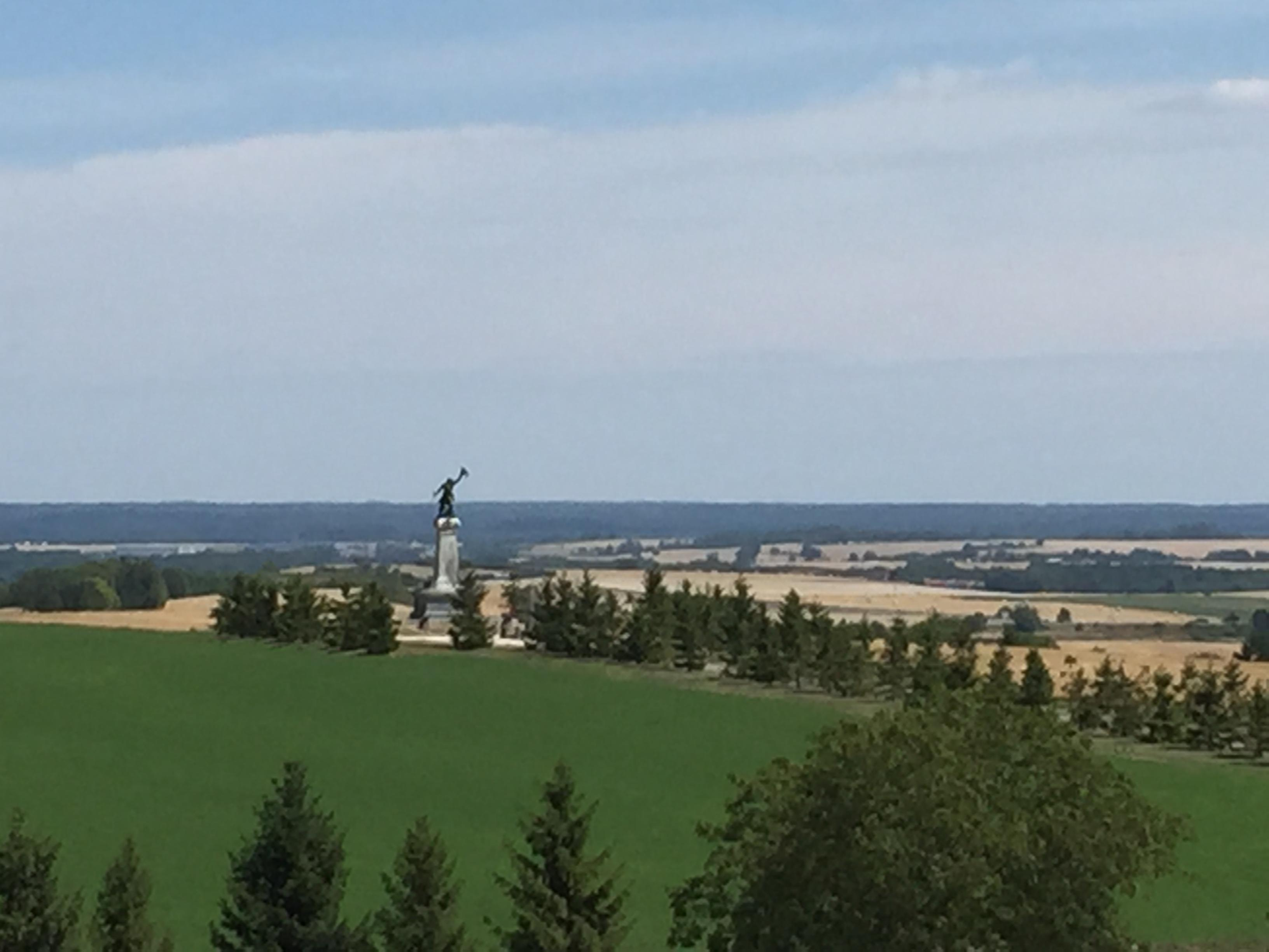 Panorama vu du Moulin de Valmy, avec, en fond, la statue commémorative du sauveur de la ville, Kellermann.